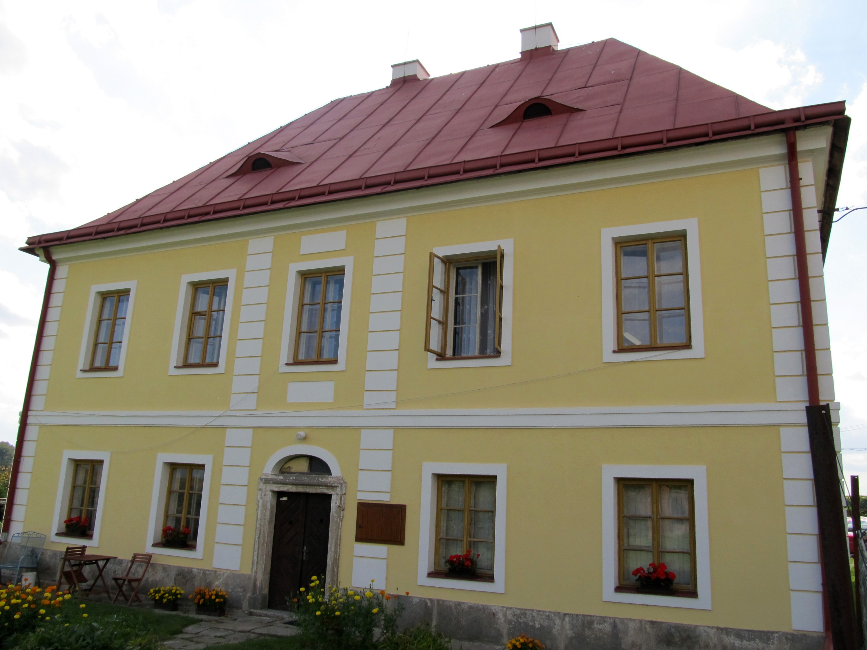 Fara (Chvalkovice), Chvalkovice 44